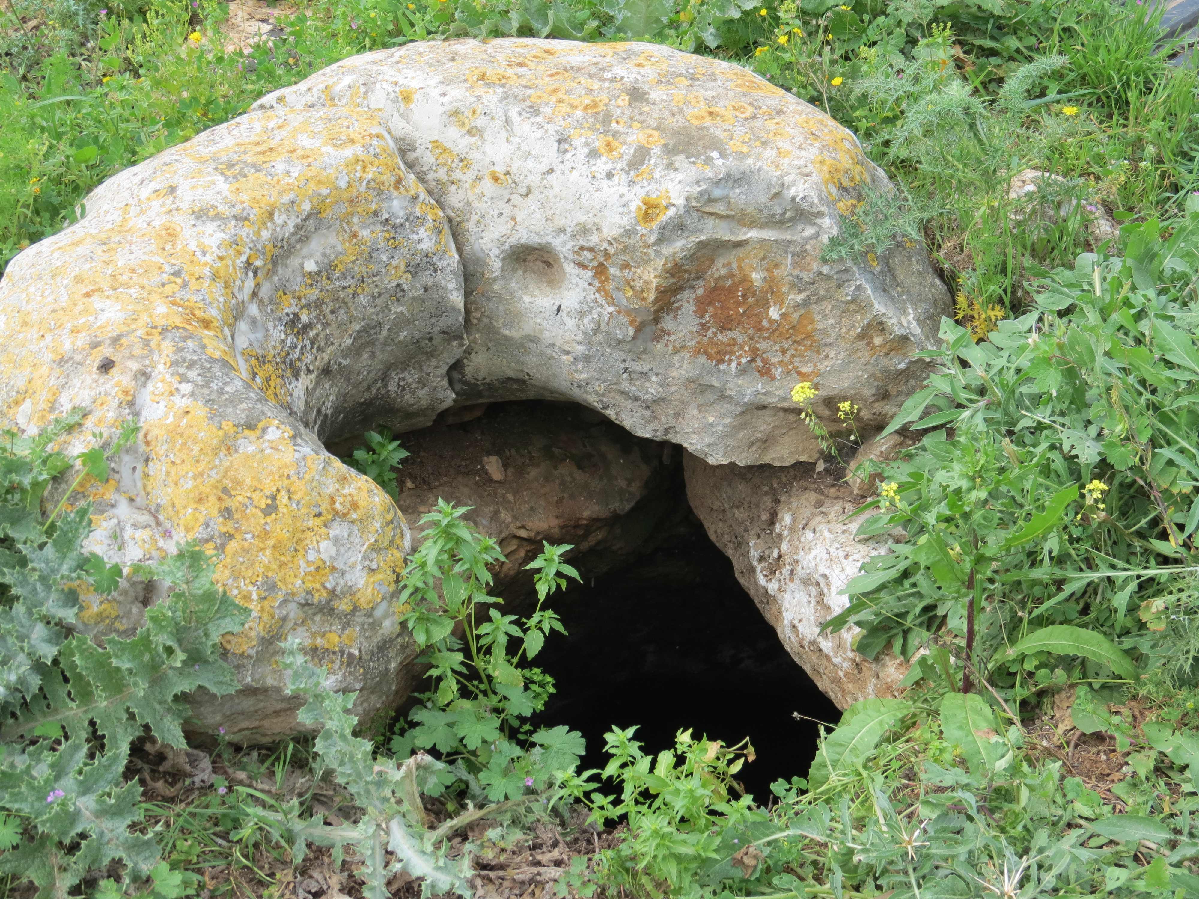 חורבת מחוז